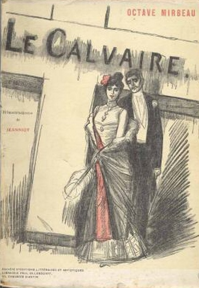 couverture de Le Calvaire, d'Octave Mirbeau (1848-1917)